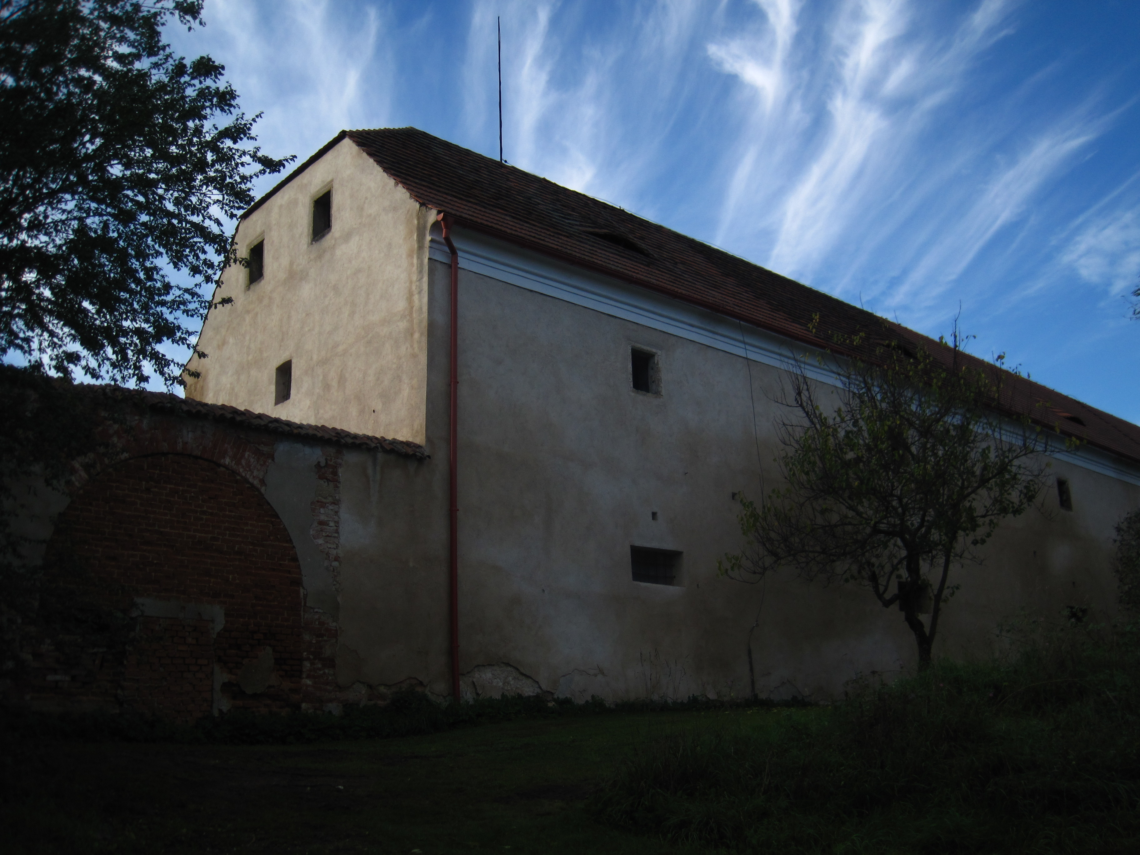 Usedlost čp. 1, Zvířetice 1, Zvířetice.